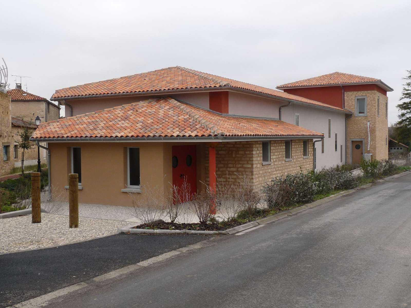 centre culturel et salle des fêtes "la Salamandre", Salles-de-Villefagnan, Charente, France